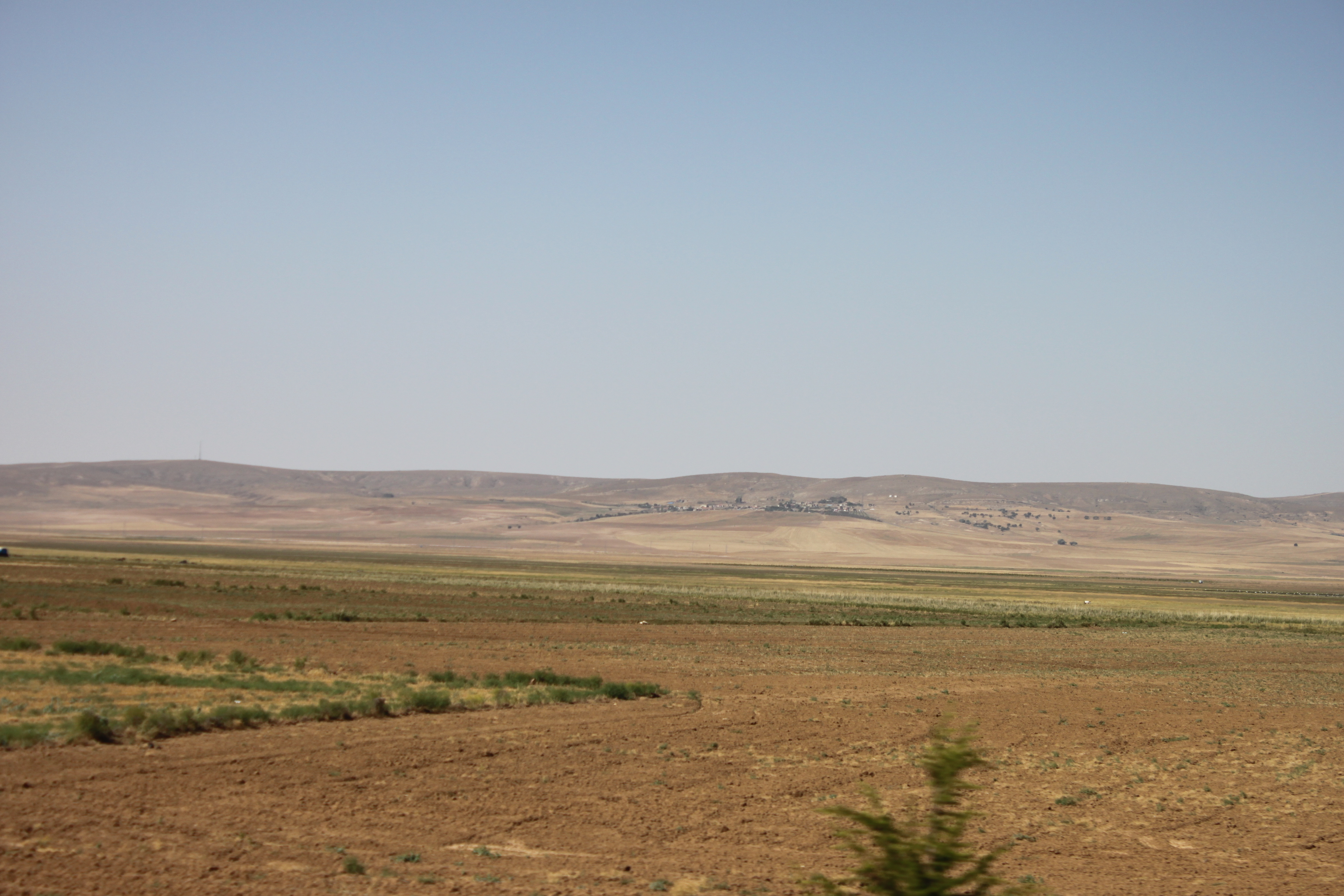 Blick von der E 90 auf das Dorf Karandere, Şereflikoçhisar, Provinz Aksaray